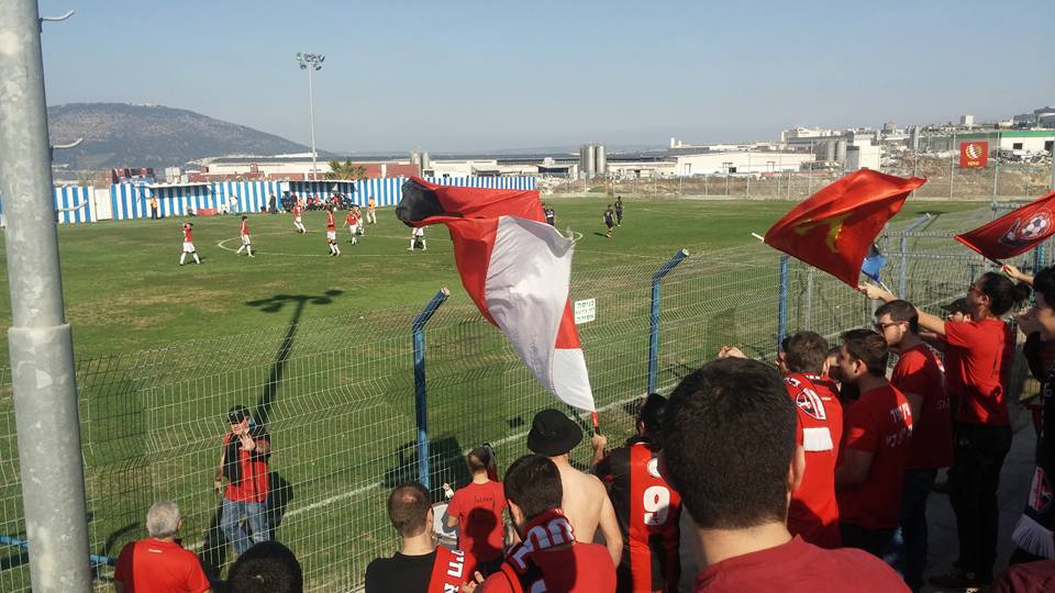 הפועל רובי שפירא חיפה, על רקע הקהל, במשחק חוץ בליגה ב' צפון ב' נגד מכבי סולם בכפר נין.